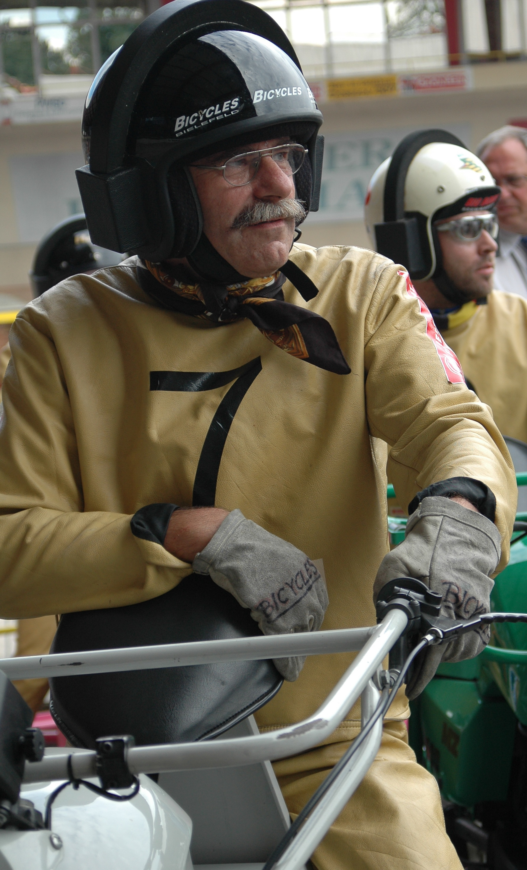 Christian Dippel, deutscher Schrittmacher, während der Bahnrad-DM in Cottbus